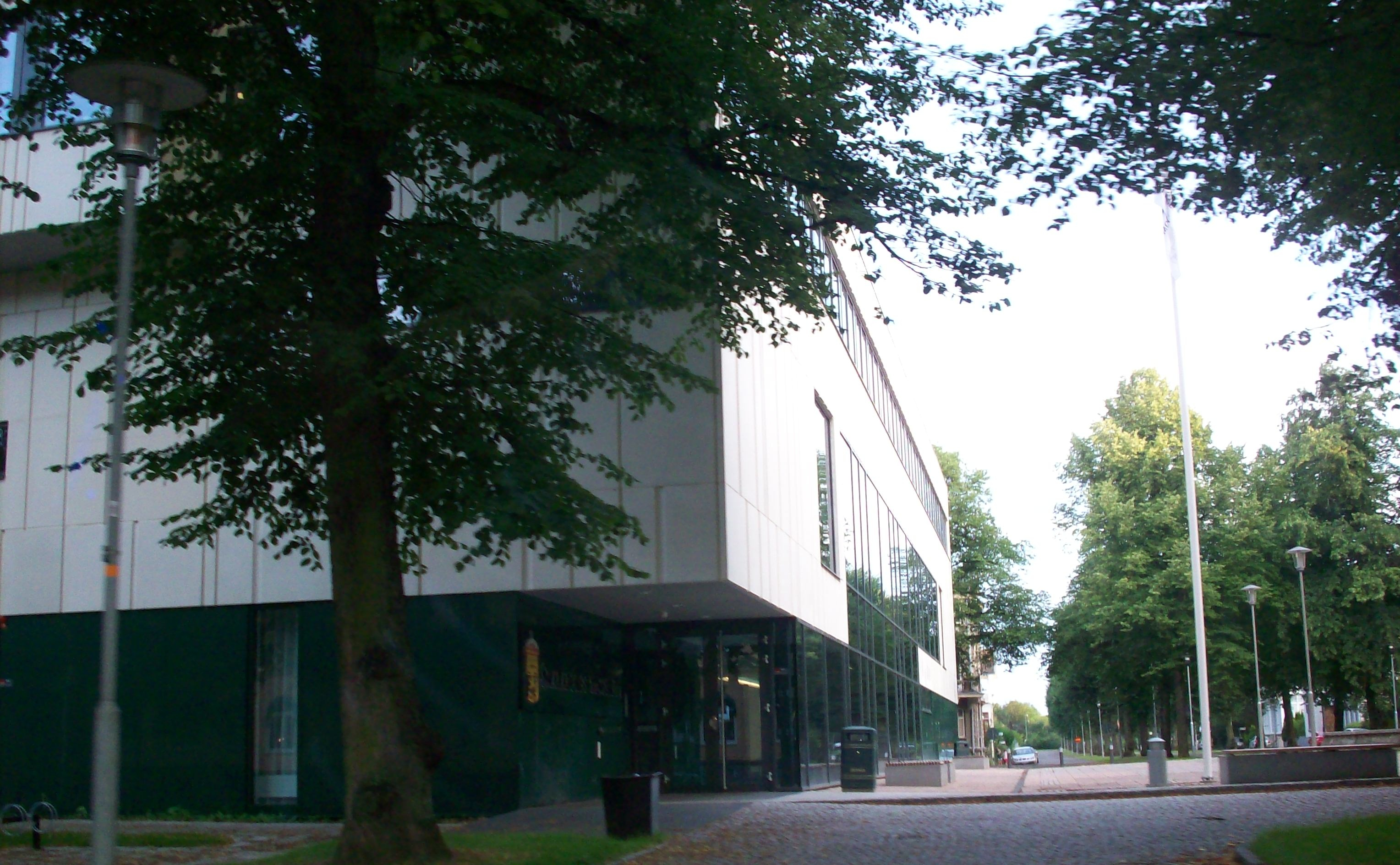 Skaraborgs Tingsrätt i Skövde på Eric Ugglas plats